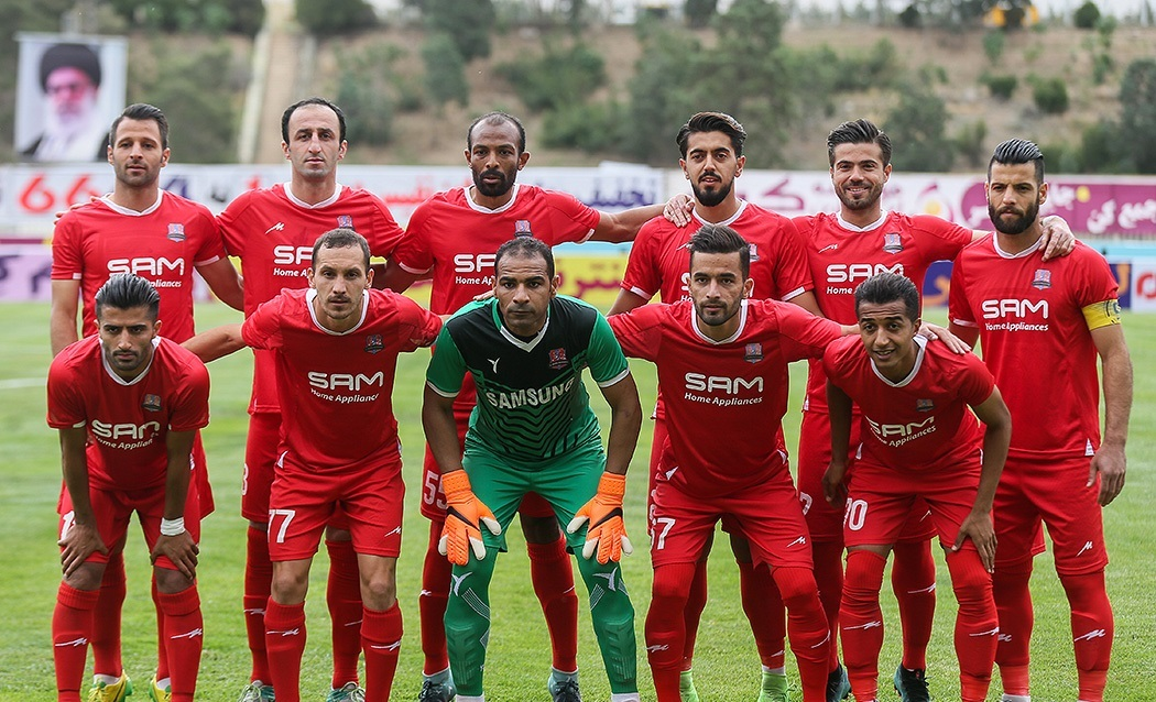 مازِرونی: نساجی و راه آهن خجیر کا